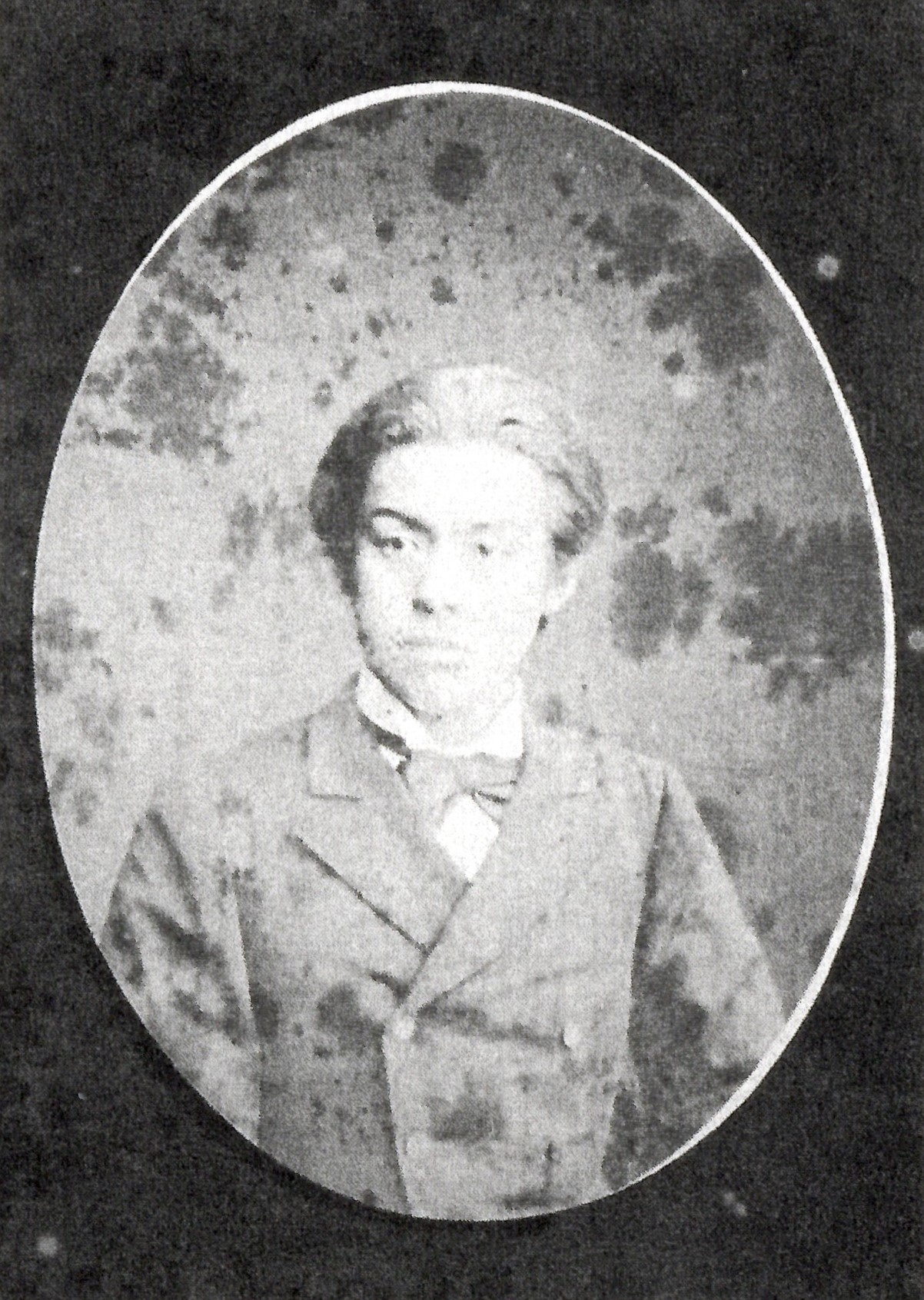 土方雄志の肖像写真。